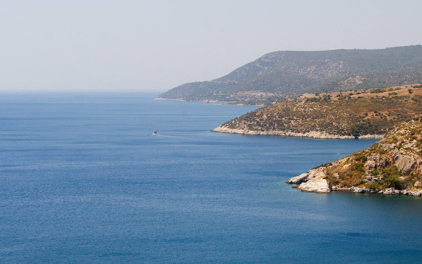 Landschaft von Izmir, Türkei